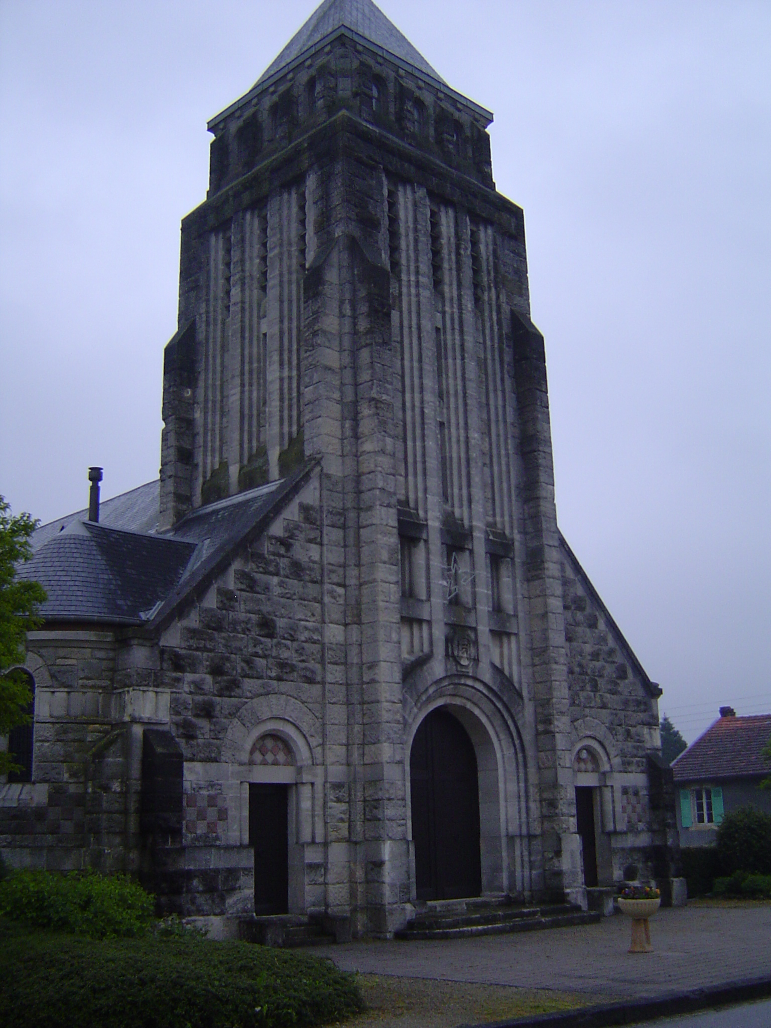 Kerk